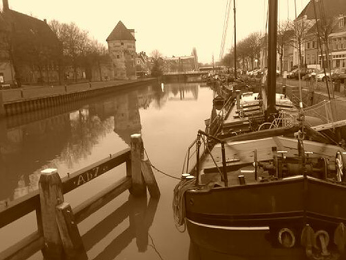 Thorbeckegracht in Zwolle.